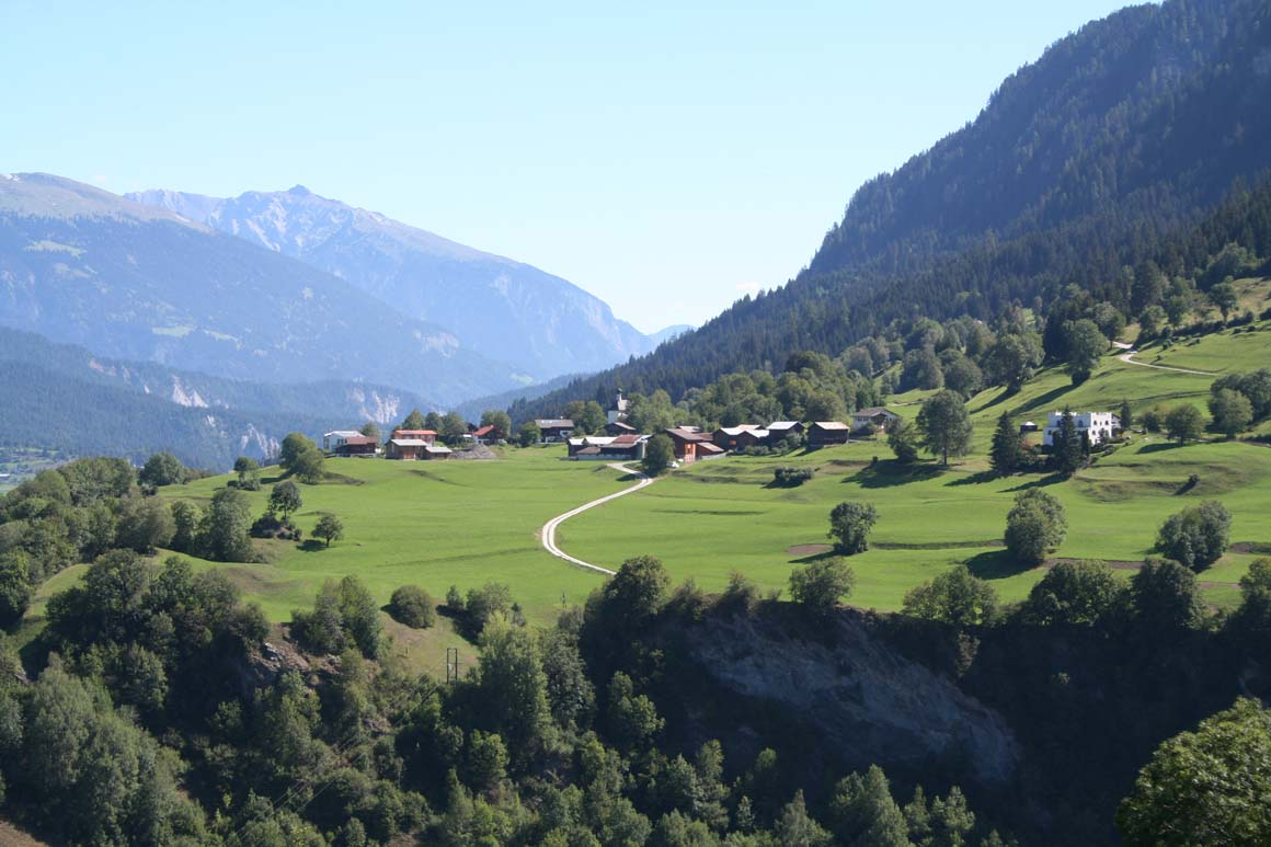 Sevgein